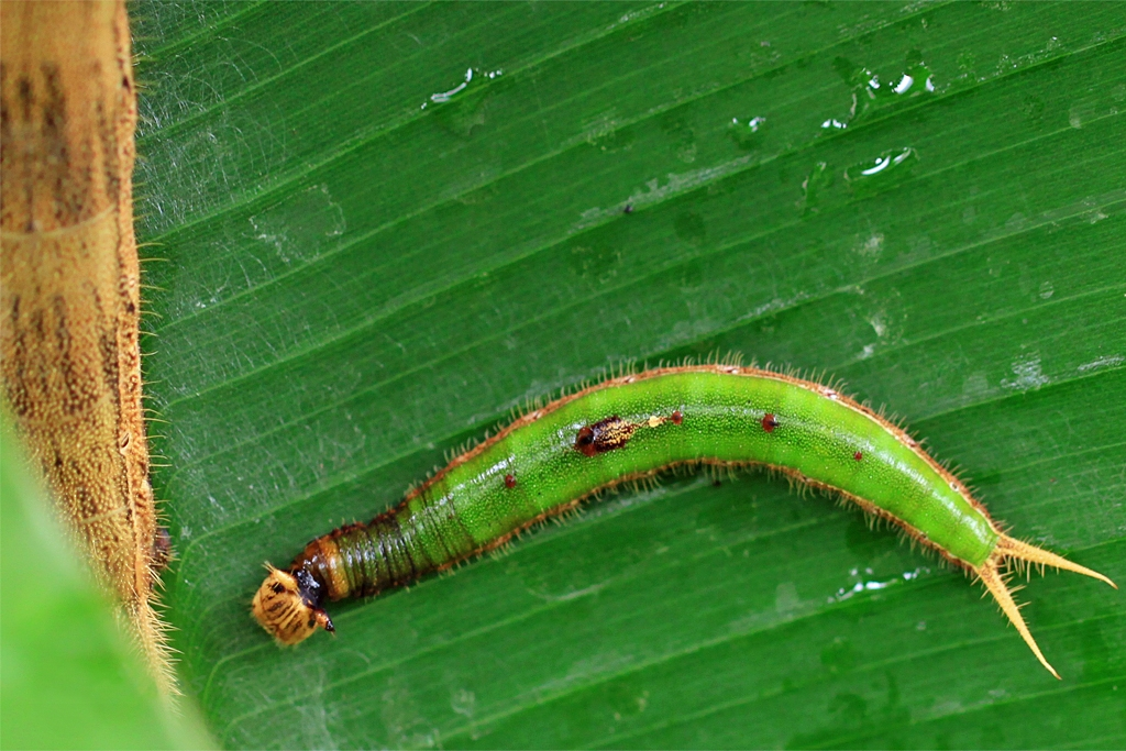 Die Aufnahme der juvenilen Raupe des Bananenfalters entstand in Trassenheide, Insel Usedom